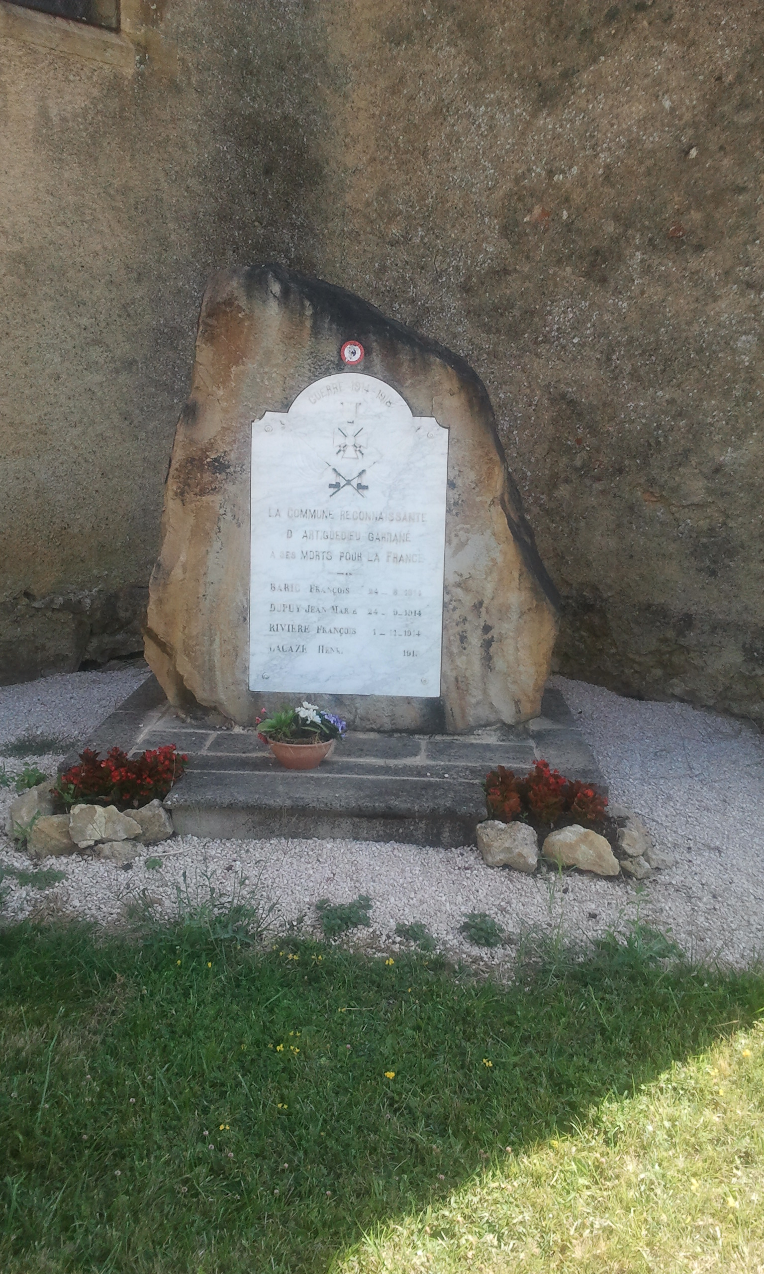 Monument aux morts d'Artiguedieu